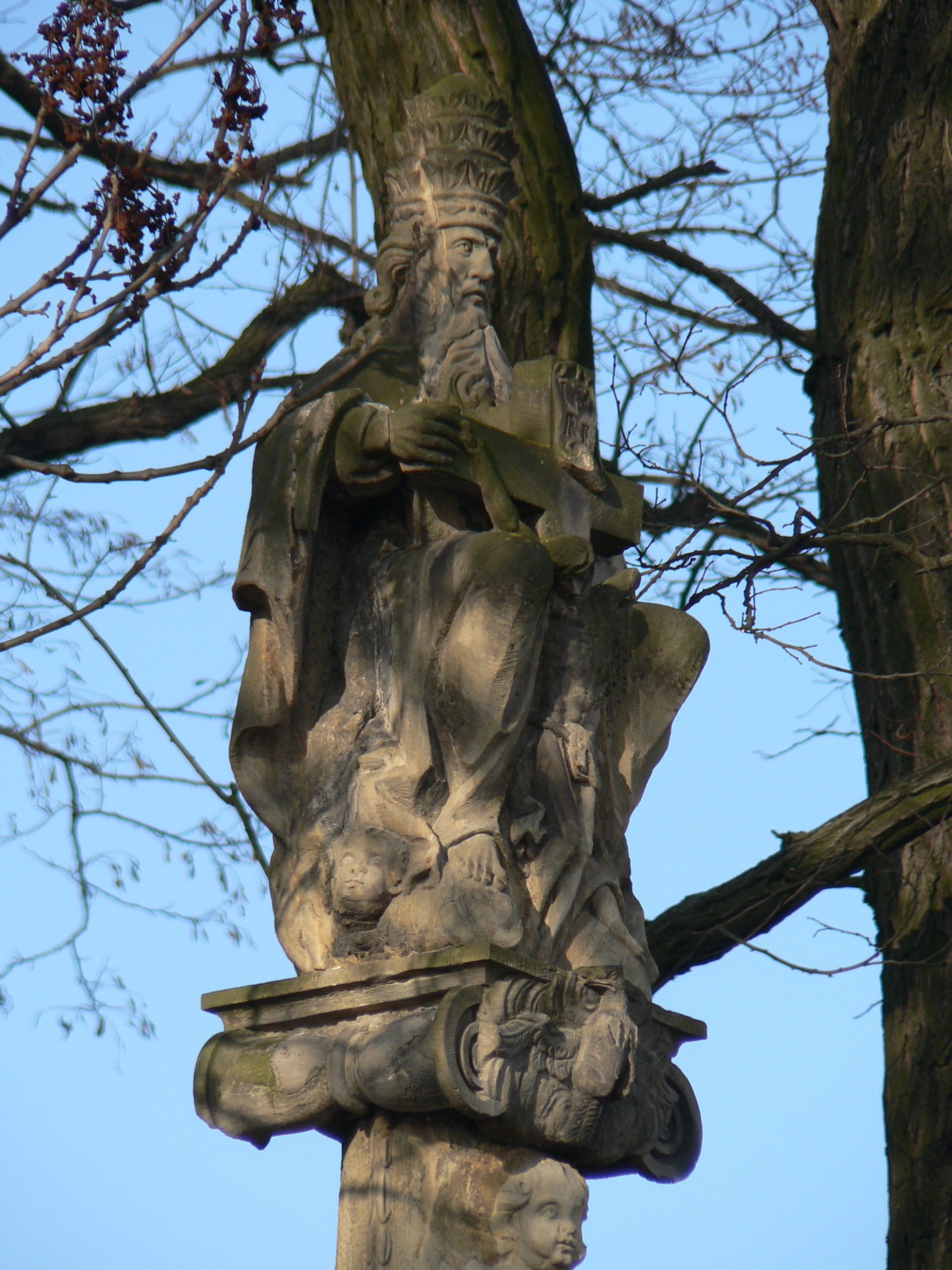 Sloup Nejsvětější Trojice z roku 1853 u části Vlachov, rozcestí na Slavoňov